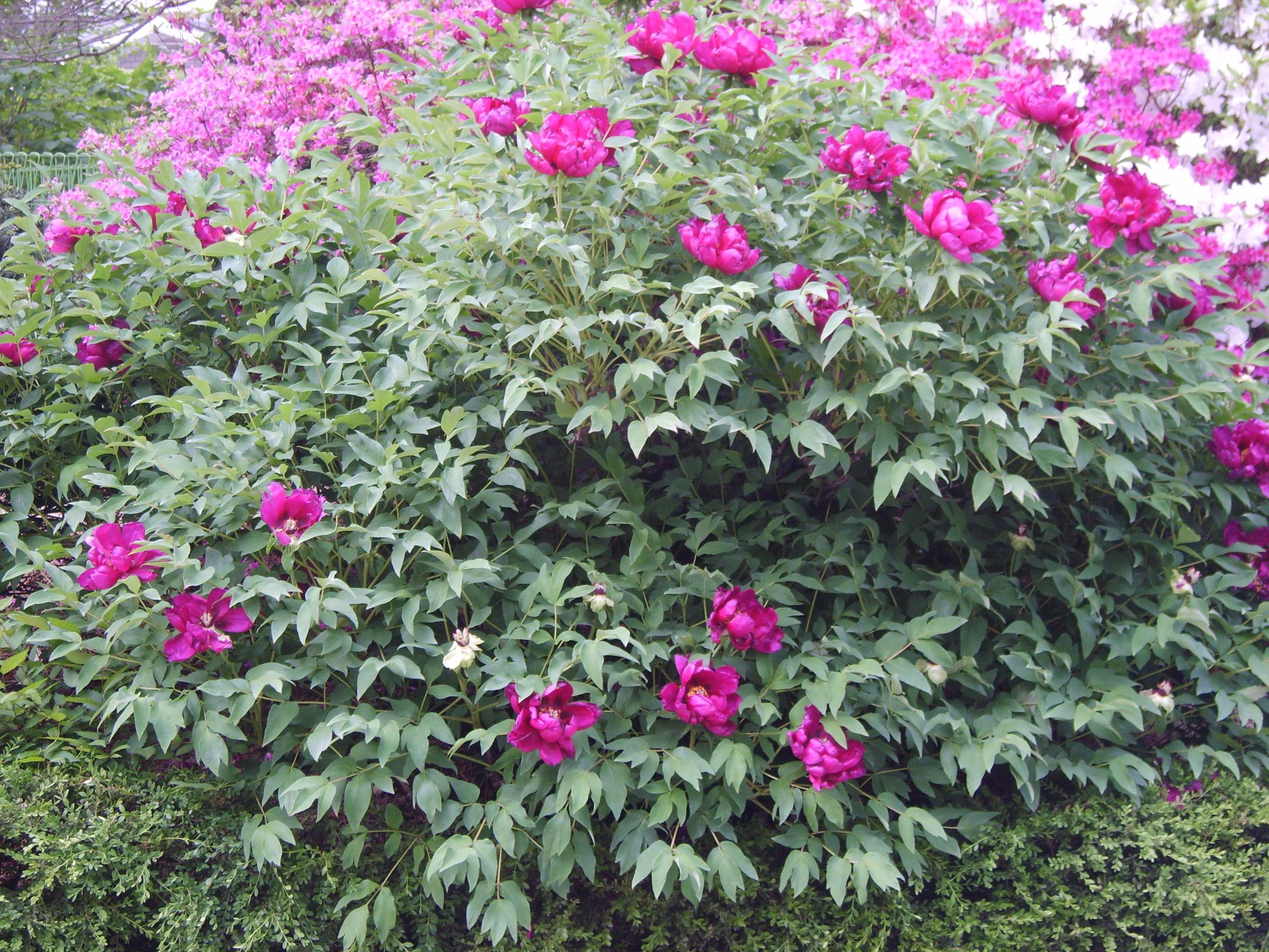 Paeonia suffruticosa in Bupyung, Korea